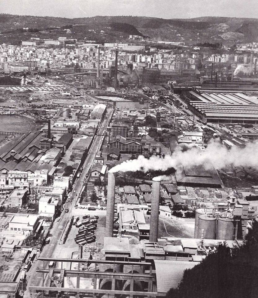 Bagnoli (NA) - Zona industriale vista dal Parco della Rimembranza (Posillipo), con la Cementir (in primo piano) e l' Italsider subito dopo. Autore sconosciuto.